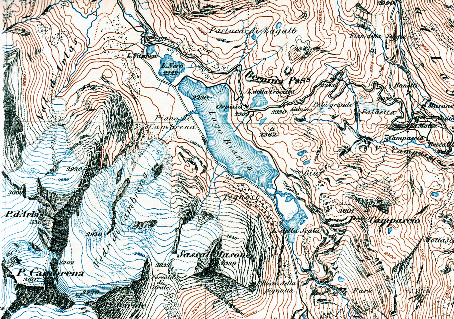 Der Berninapass 1877 im Topographischen Atlas der Schweiz, Blatt Poschiavo (522), 1:50 000